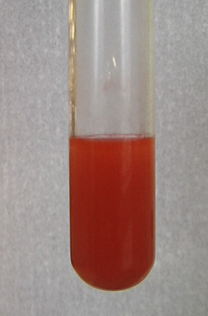 Antimoon (kwalitatieve analyse)